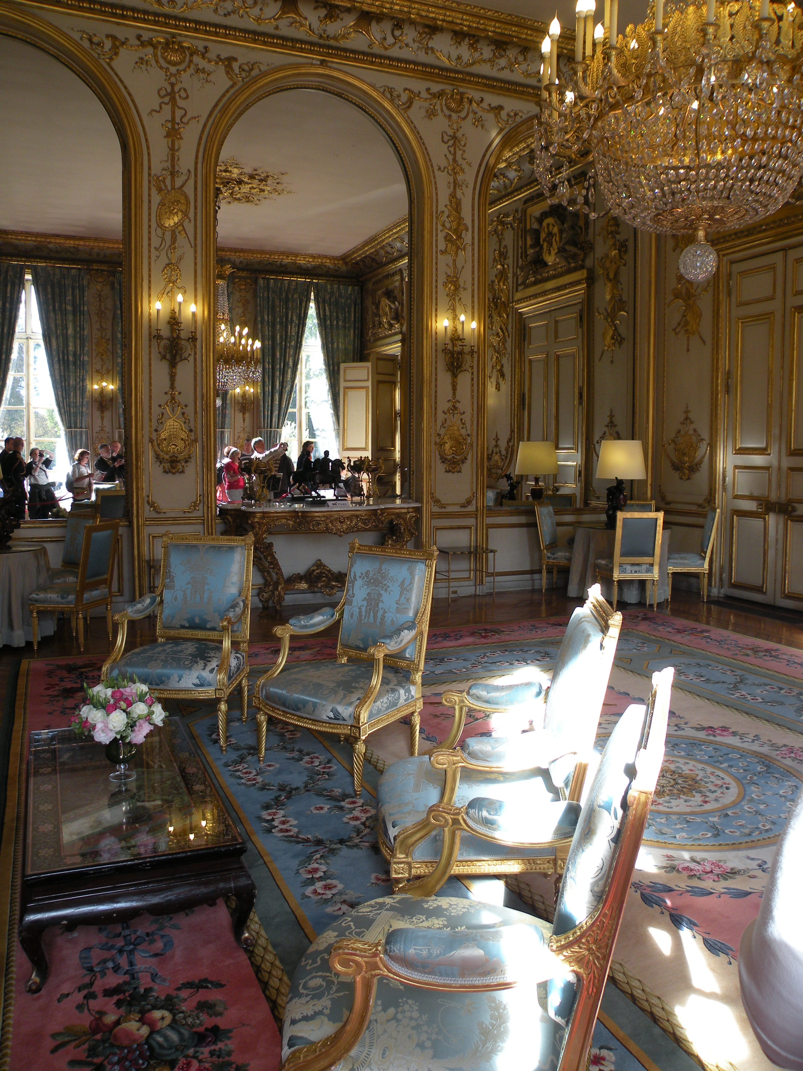 salon des ambassadeurs